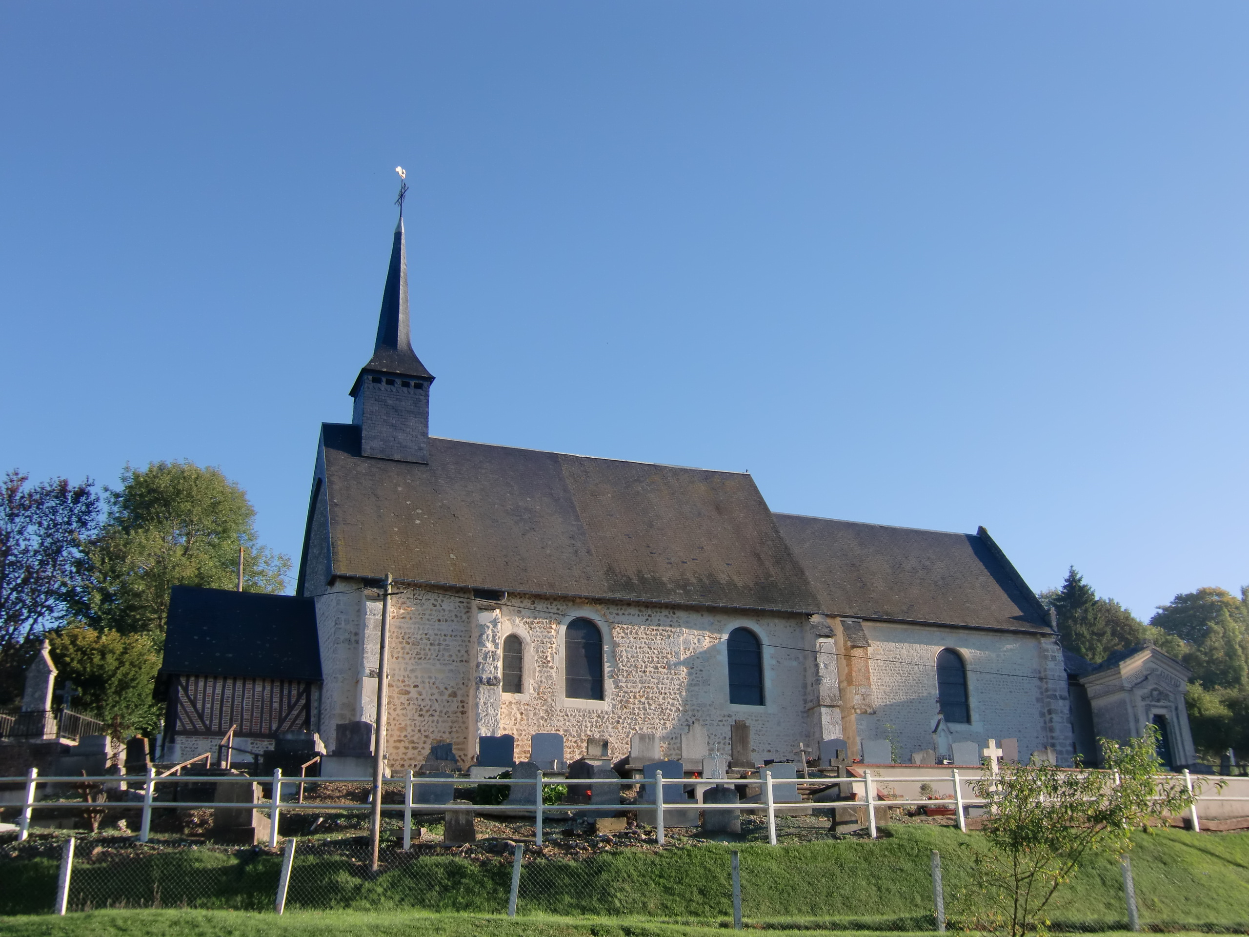 église de Saint-Sylvestre-de-Cormeilles (Eure, Normandie, France)